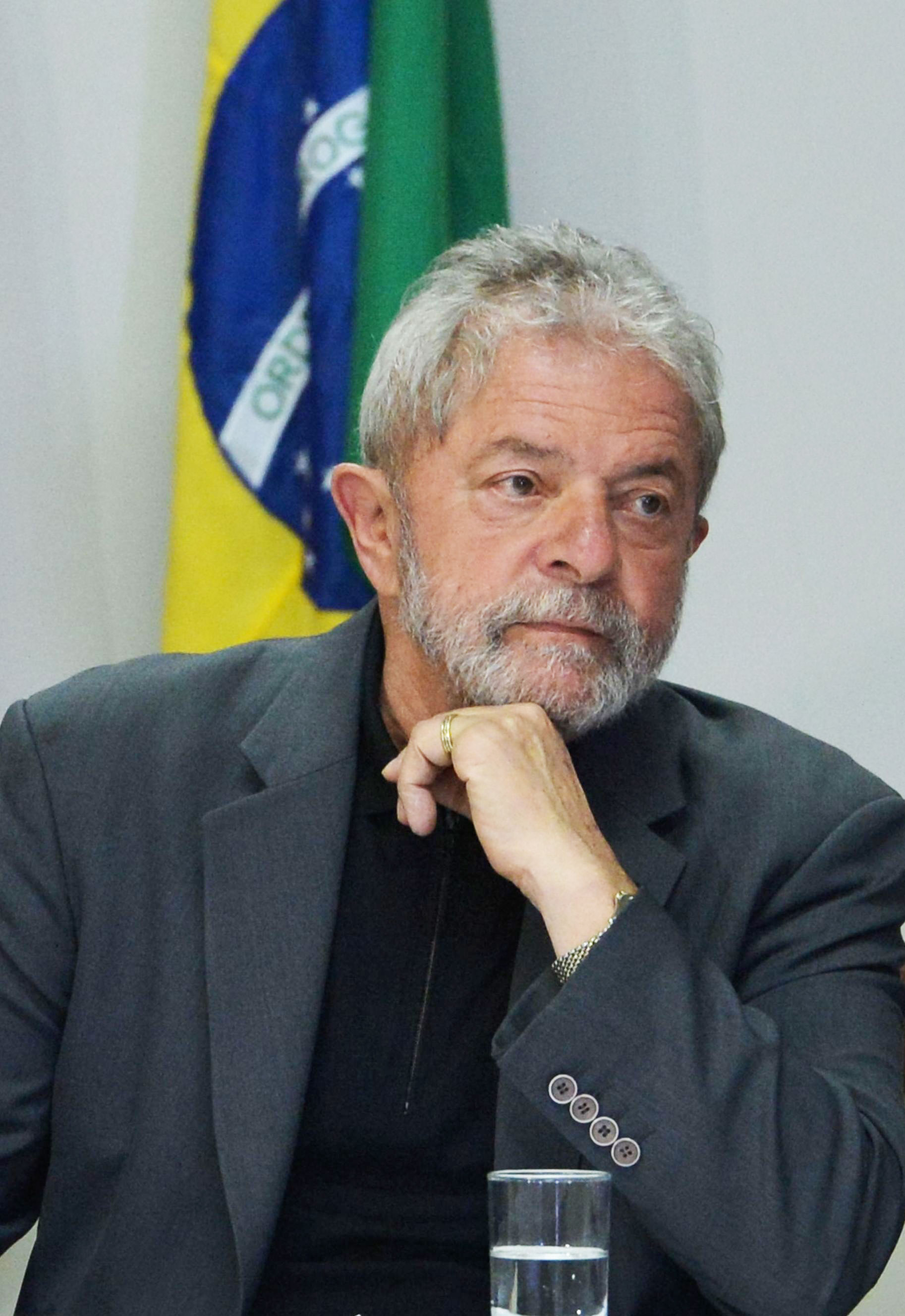 Português do Brasil: O ex-presidente Luiz Inácio Lula da Silva se reúne com bancadas do Partido dos Trabalhadores (PT) no Senado Federal e na Câmara dos Deputados.